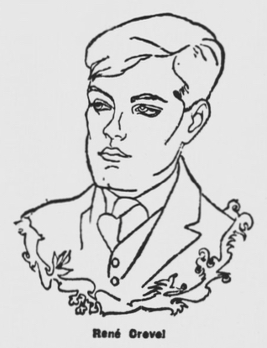 portrait de René Crevel paru dans Les Nouvelles littéraires, artistiques et scientifiques : hebdomadaire d'information, de critique et de bibliographie, 18 décembre 1926.